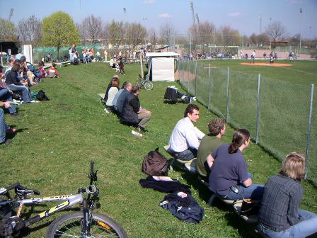 Boars Field, Spielfeld des Baseball Club Baldham Boars e.V.